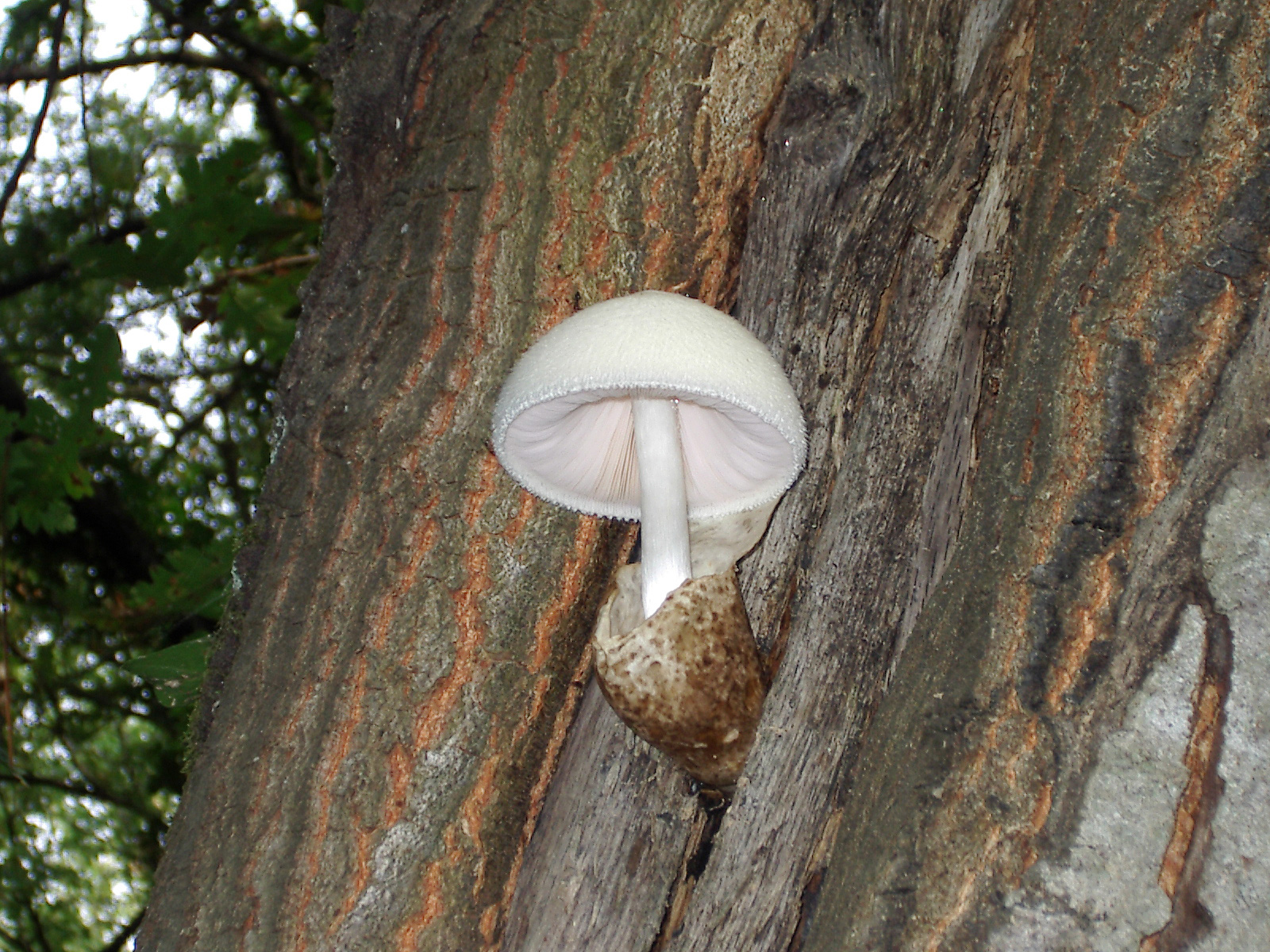 Volvariella bombycina - Ponsacco (PI), Italy - Ottobre 2004 - foto personale - (c) B.Baldassari